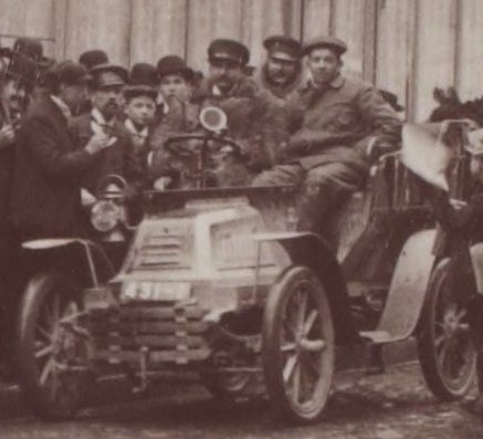 [Collection Jules Beau. Photographie sportive] : T. 17. Année 1902 / Jules Beau : F. 2. [Caravane Paris - Nice], Sens